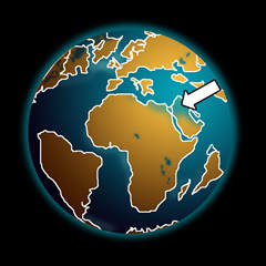 Ubicacion del observador del Génesis en la deriva continental paso 3